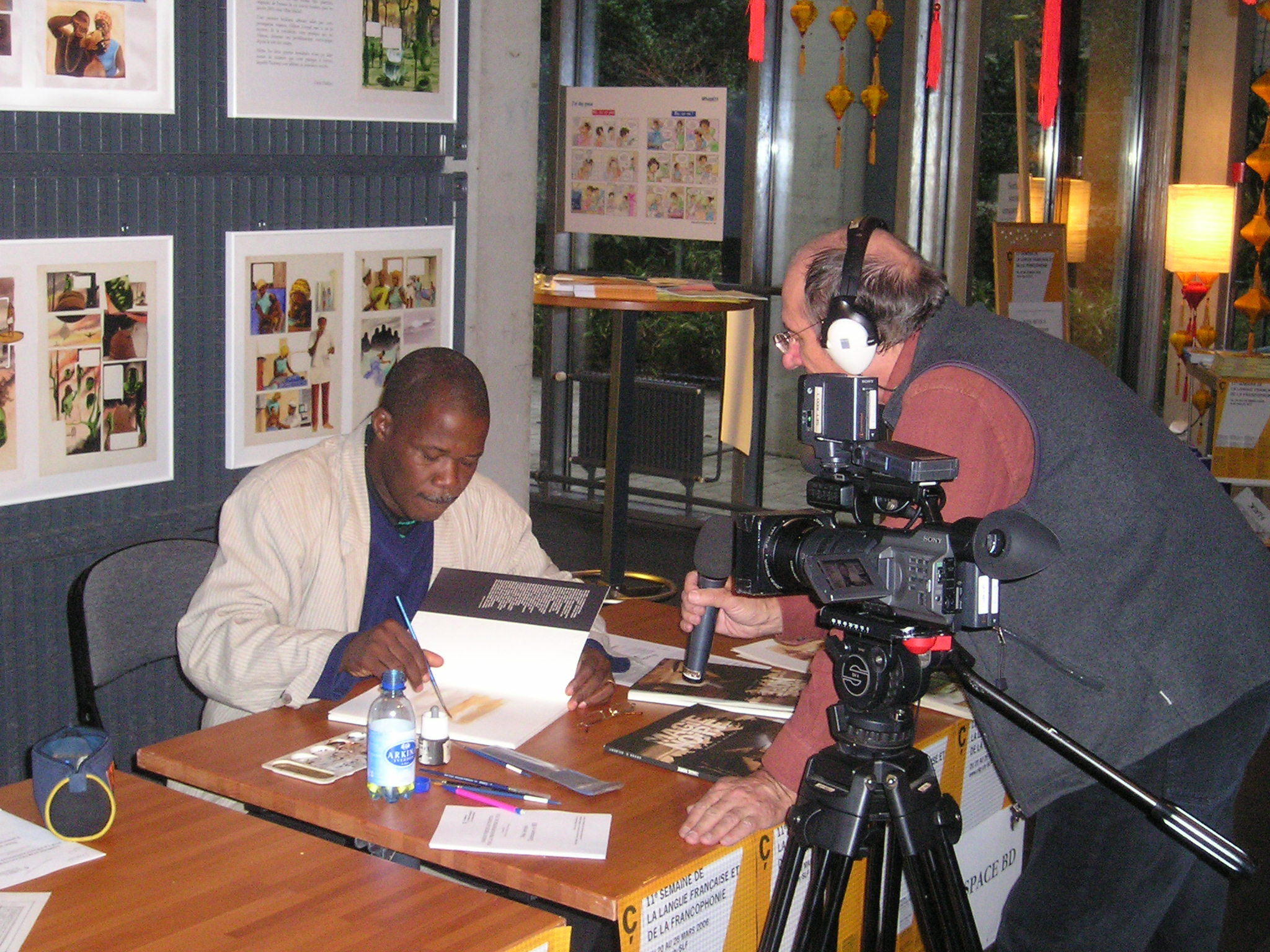 Graphiste Groud G. Gilbert signe son nouveau BD "Magie Noire", Suisse 20.3.2006